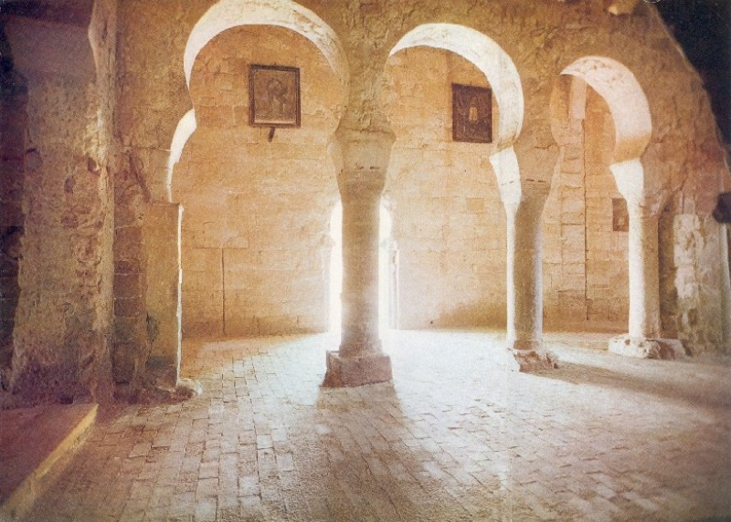 Date du cliché : septembre 2001.